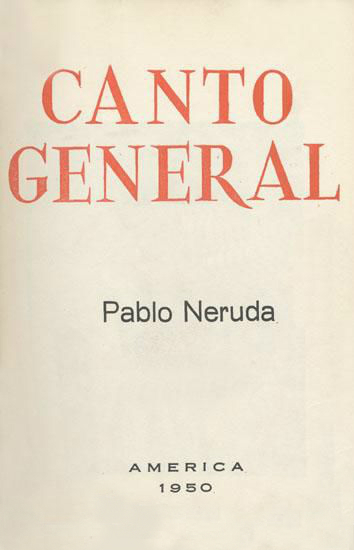 Primera edición de "Canto general" de Pablo Neruda. [México] : Edit. América, 1950. [xv], 447 p.